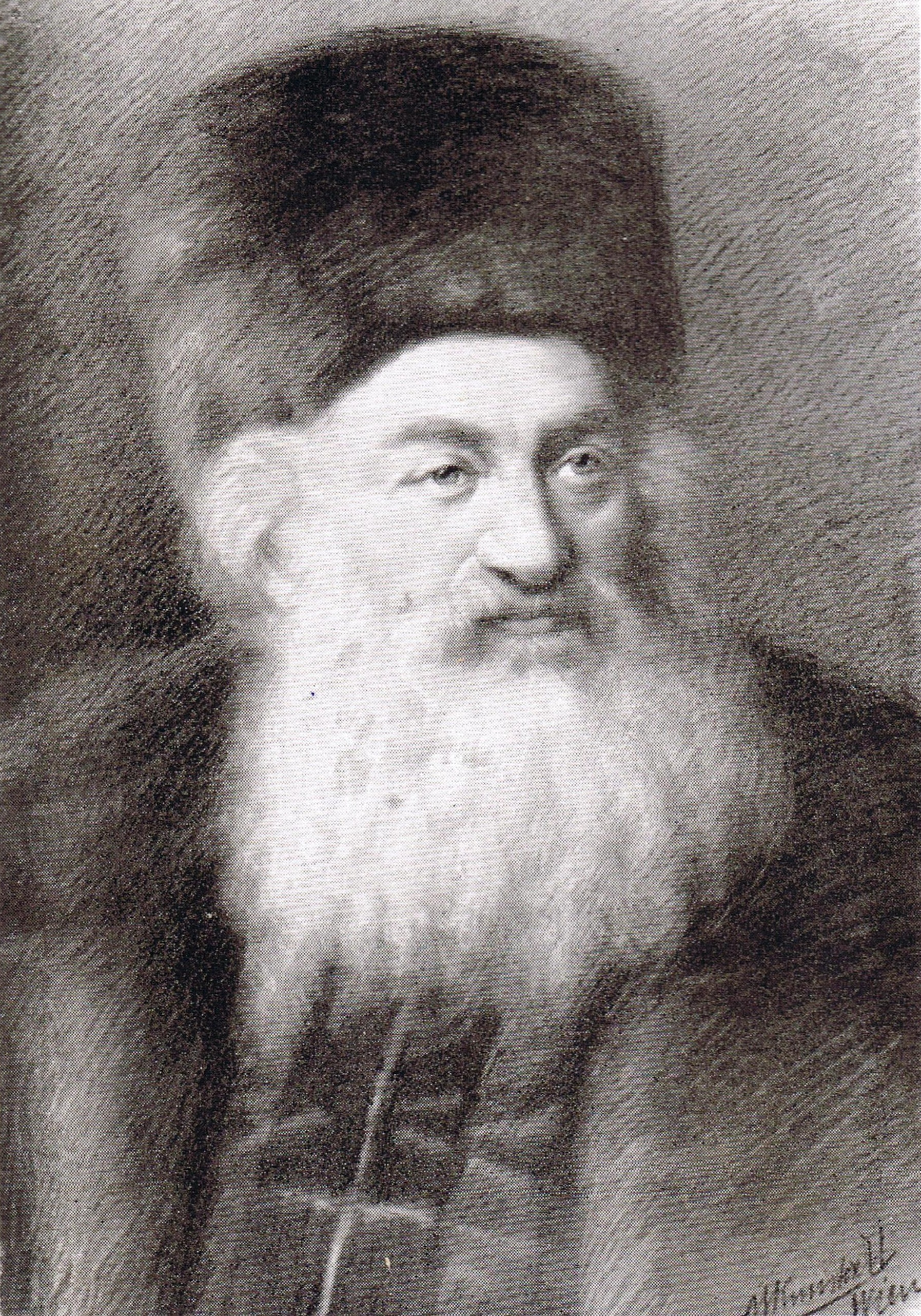 Simon Schreiber